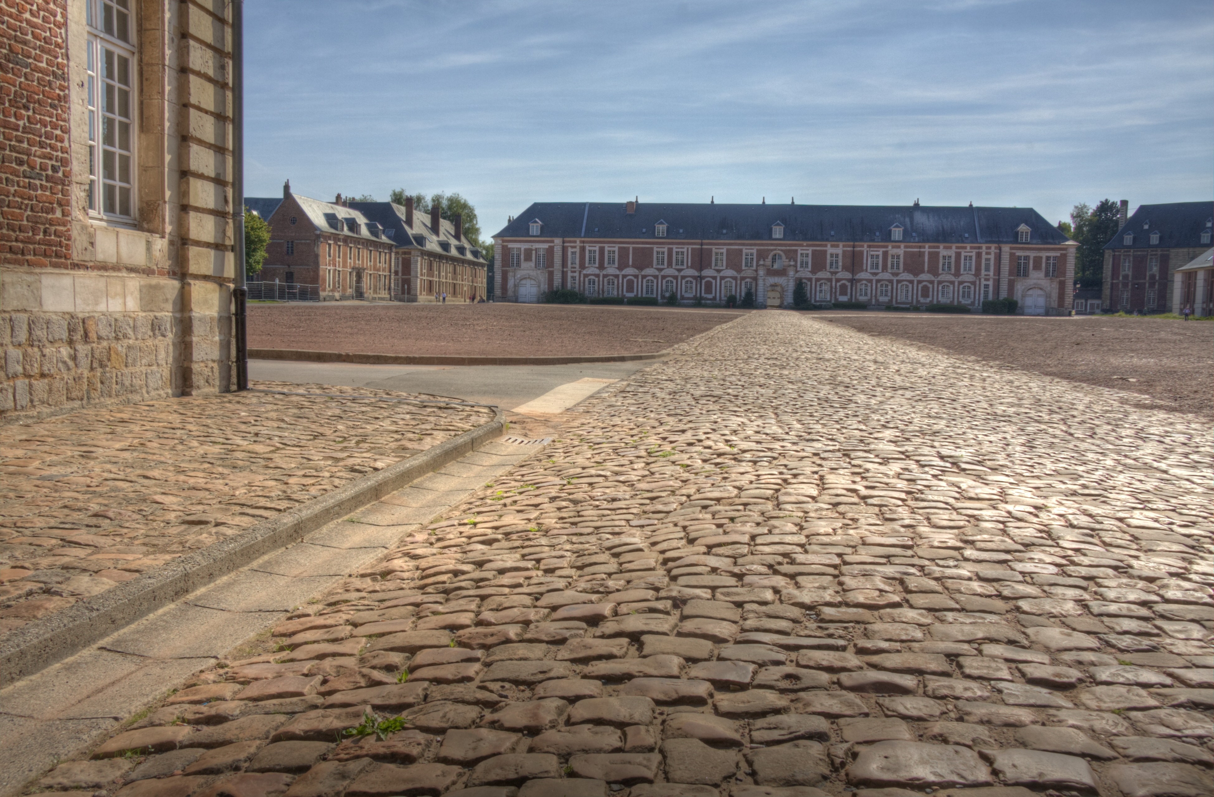 La citadelle d'Arras (Pas-de-Calais, France).